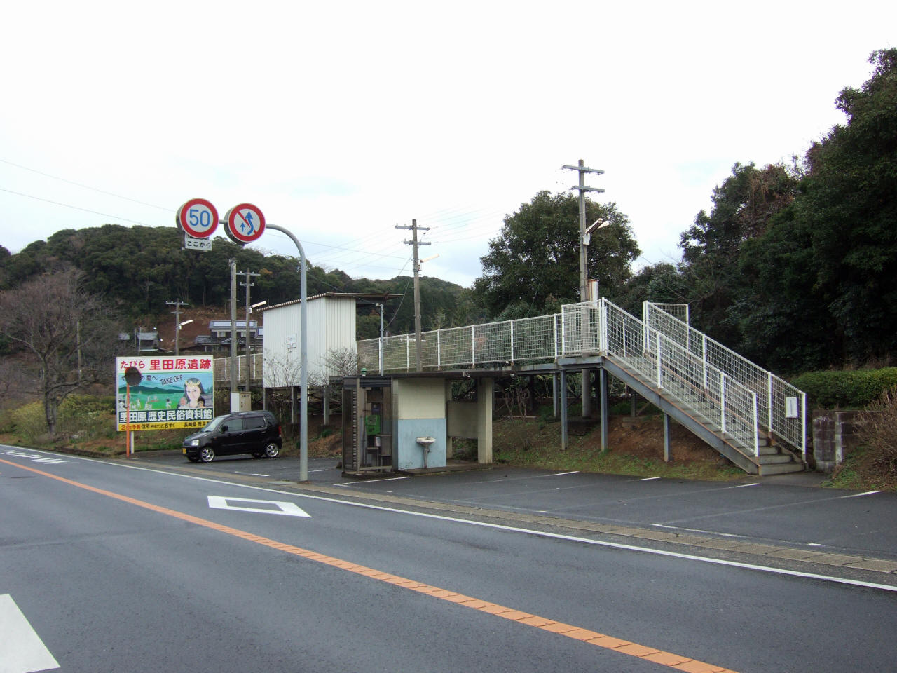 松浦鉄道中田平駅（Matsuura Railway Naka-Tabira Station）